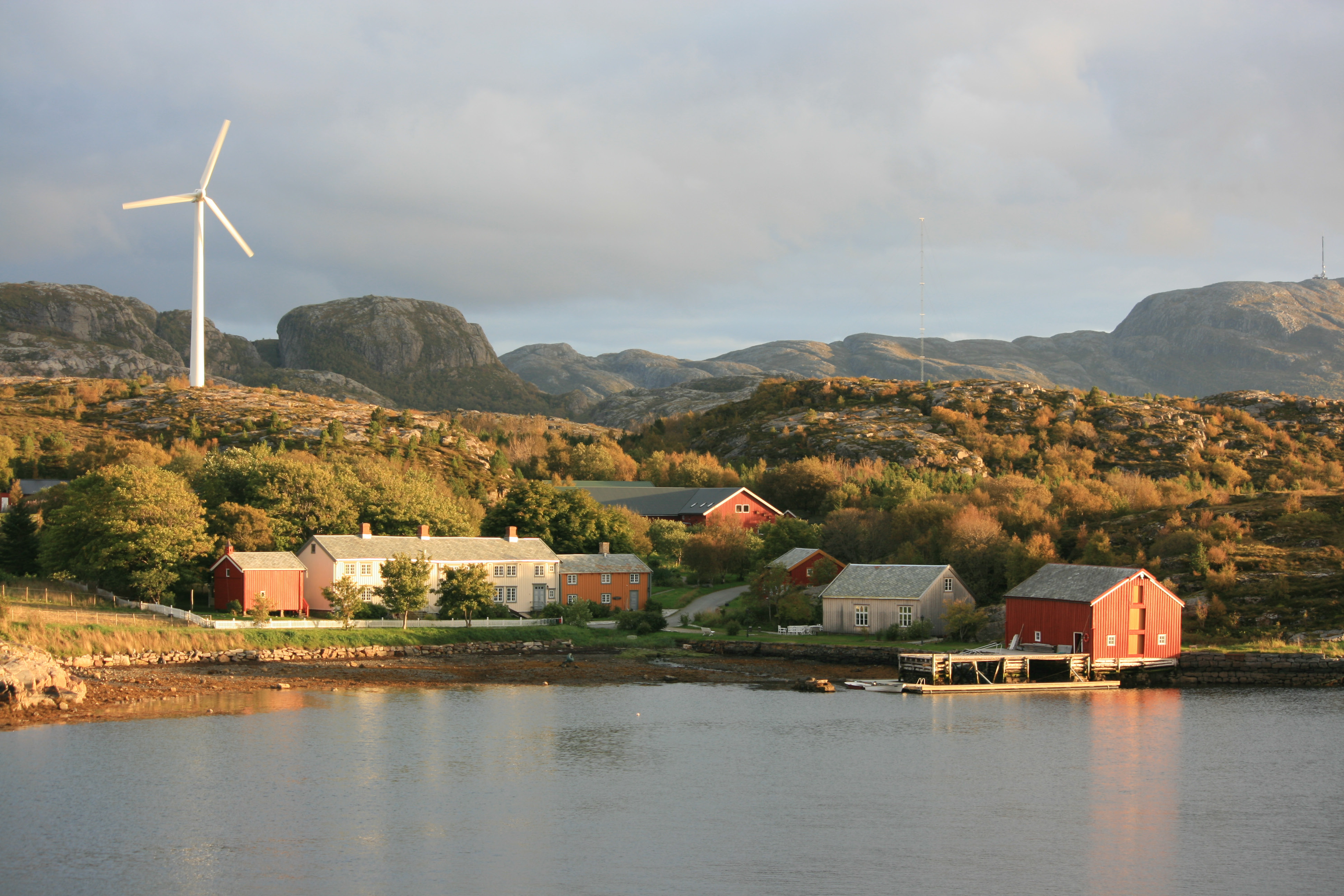 Bildet er av Vallersund gård i Bjugn kommune, et handelssted fra 1700-tallet, som også hadde fiskemottak. Nå drives gården som en Camphill-landsby, en antroposofisk insititusjon for utviklingshemmede og tidligere rusavhengige. Bildet er tatt 16.9.2011 med et Canon EOS 400 D.